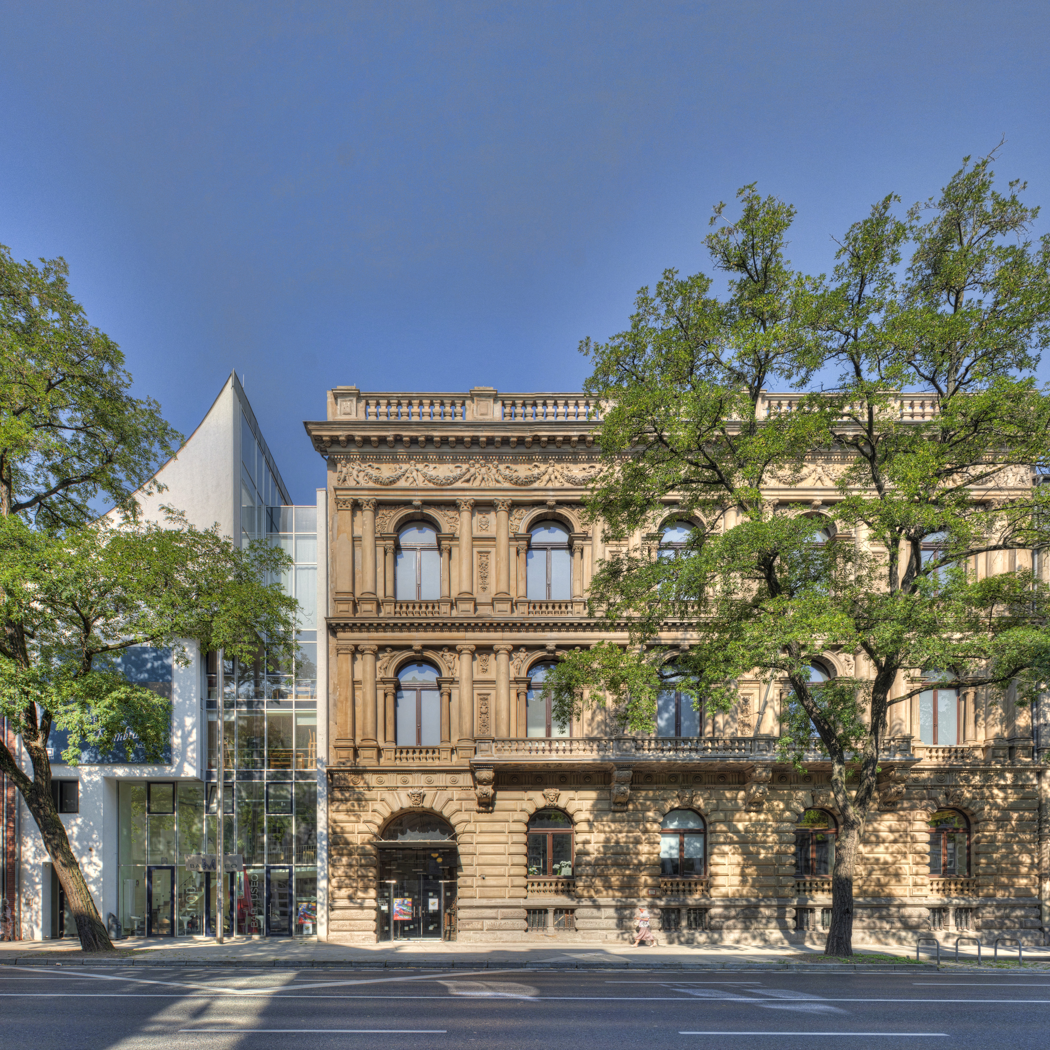 Aachen, Wilhelmstraße 18: Villa Cassalette, 1883-1888 – Dreigeschossige Stadtvilla in fünf Achsen, Architekt Eduard Linse; 1900/01 Erweiterung durch einen rückwärtigen zweigeschossigen, fünfachsigen Gebäudeteil inklusive Oberlichtsälen nach Plänen von Stadtbaumeister Joseph Laurent; Werksteinfassade aus Sandstein im Stil eines Palazzo der venetianischen Renaissance; hohes Sockelgeschoss mit Toreinfahrt, in der linken Achse darüber zwei Obergeschosse mit waagerechten Brüstungsbändern gegliedert und einem Mittelbalkon im ersten ObergeschossThis is a photograph of an architectural monument., no. 0